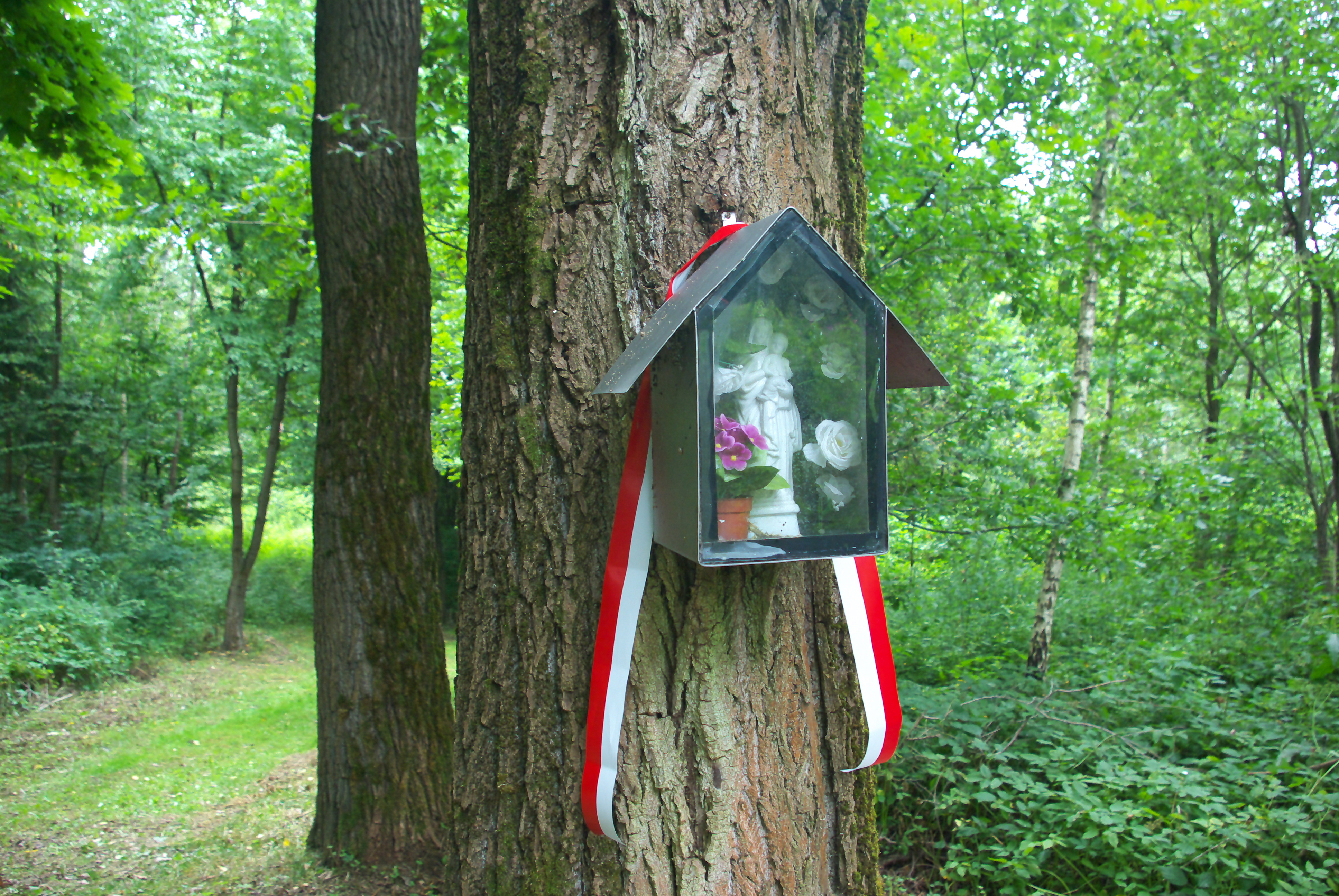 Miejsce pamięci w Hanusiskach pod Zagórzem, upamiętniające ofiary egzekucji dokonanej przez Niemców 27 lipca 1944. Zdjęcie z obchodów w dniu 27 lipca 2019. Kapliczka wotywna ustanowiona przez Michała Pałasza.